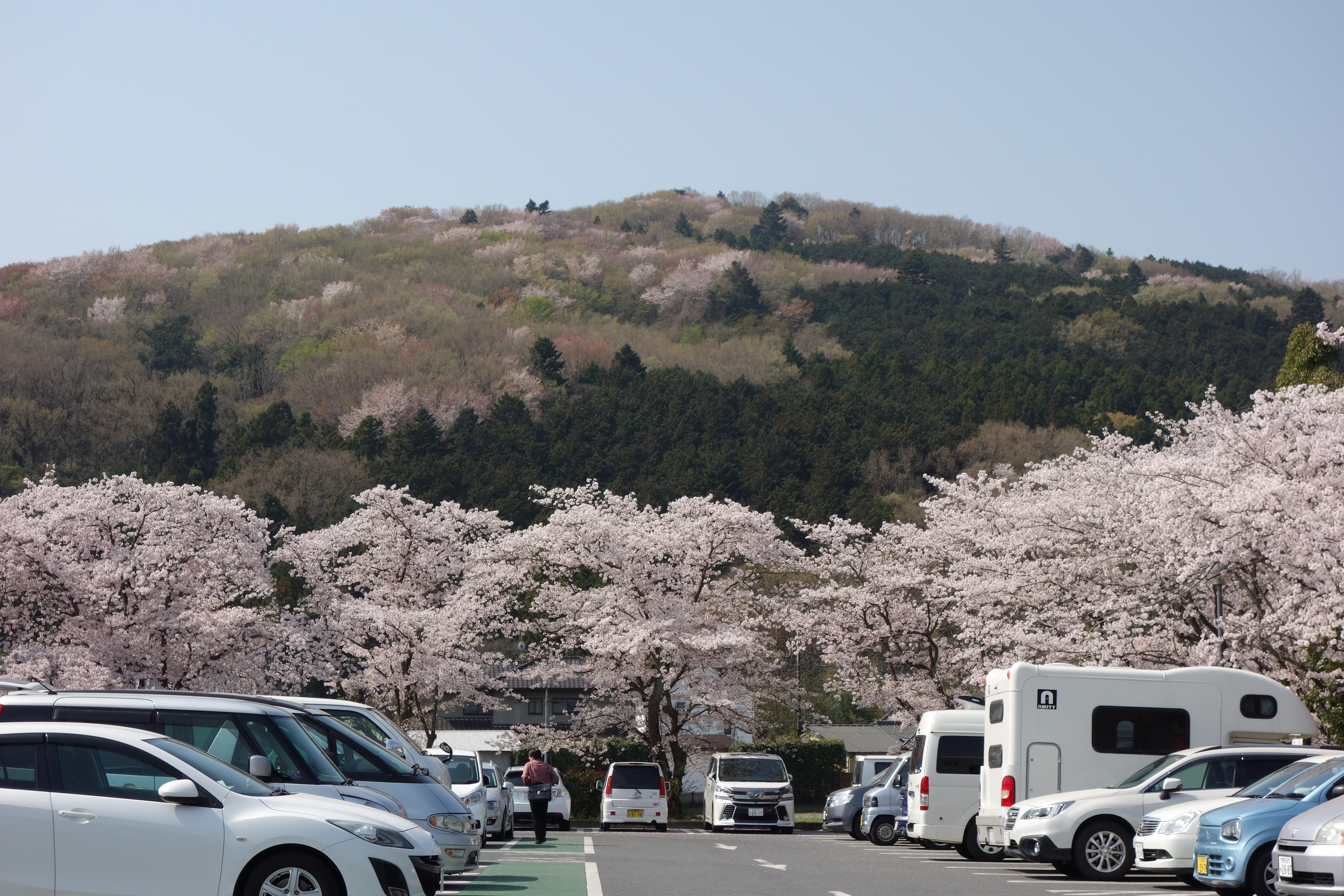 仙元山を北東から望む。道の駅おがわまちから撮影。